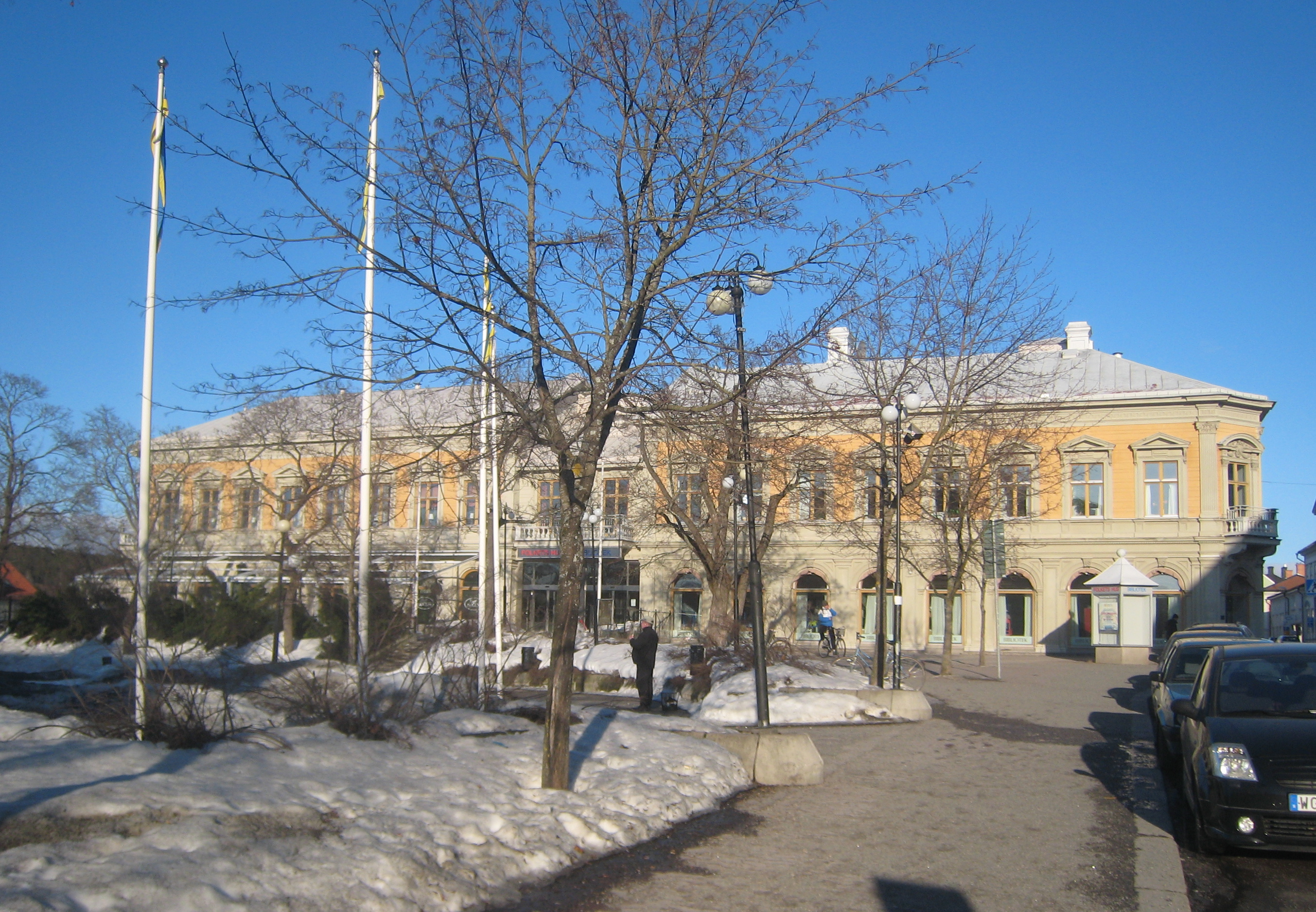 Folkets hus med biblioteket i Hudiksvall.